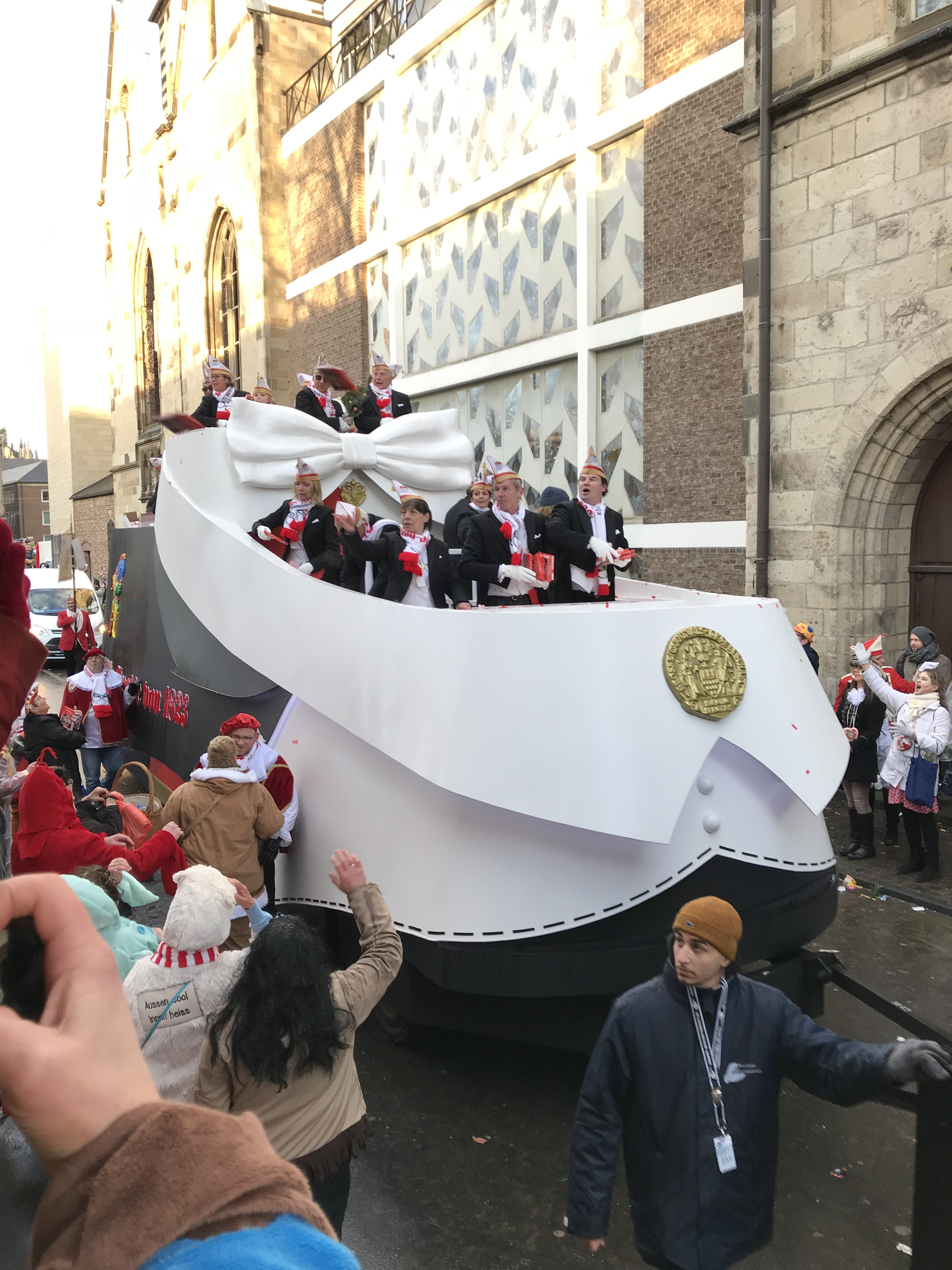 Seit 2018 ist die Grosse mit einem neuen Prunkwagen - Held Carneval - im Kölner Karnevalszug vertreten.